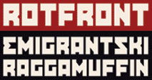 Logo der Band RotFront